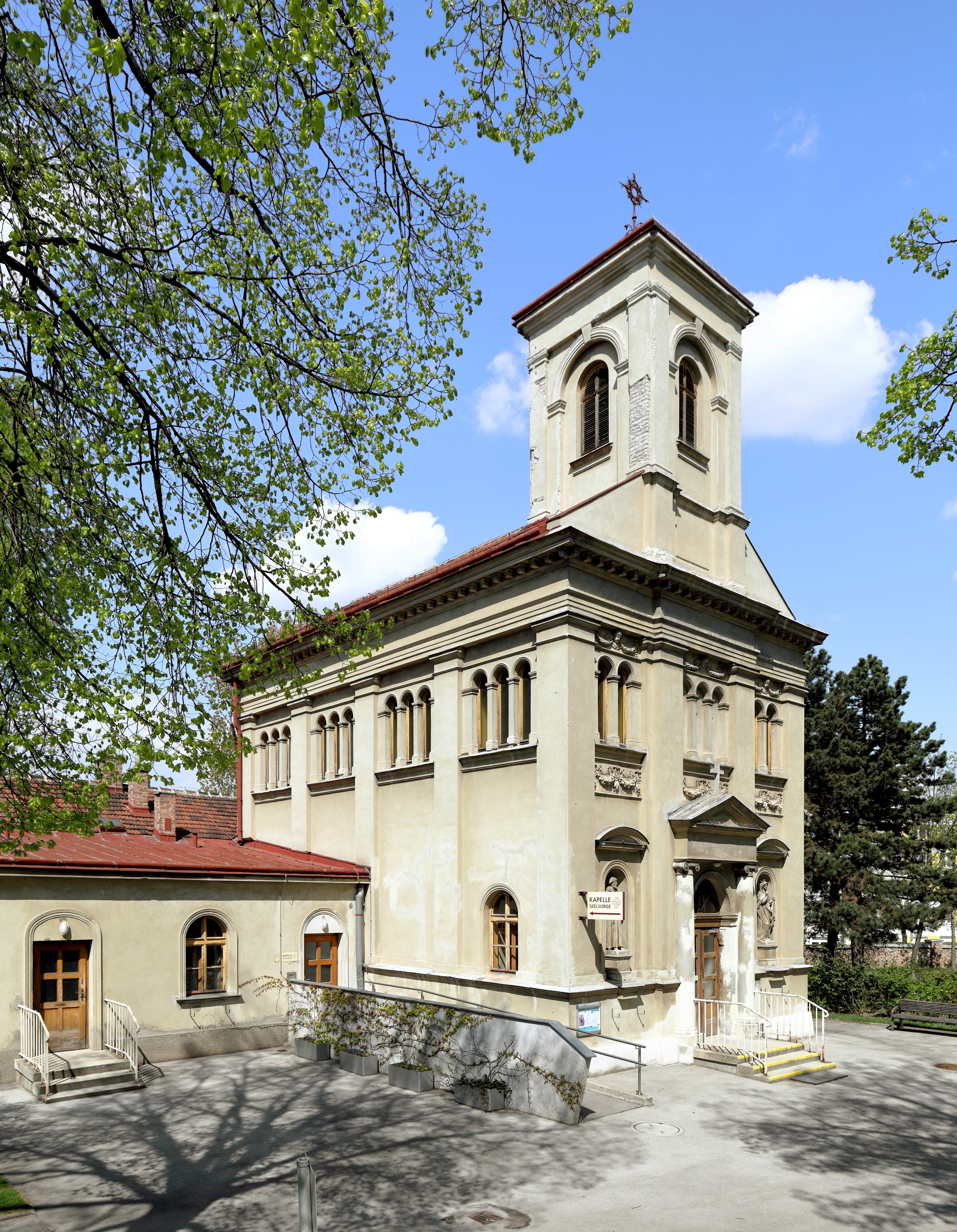 Die Spitalskapelle zum Göttlichen Erlöser des Kaiser-Franz-Josef-Spitals (heute: Sozialmedizinisches Zentrum Süd) im 10. Wiener Gemeindebezirk Favoriten und links angebaut die ehemalige Priesterwohnung. Die freistehende Saalkirche mit einer eintürmigen Fassade und einer Neorenaissance-Gliederung wurde 1890/91 errichtet und war ursprünglich der hl. Barbara geweiht. Die Figuren in den Nischen stellen die hl. Elisabeth von Thüringen und den hl. Franz von Assisi dar.